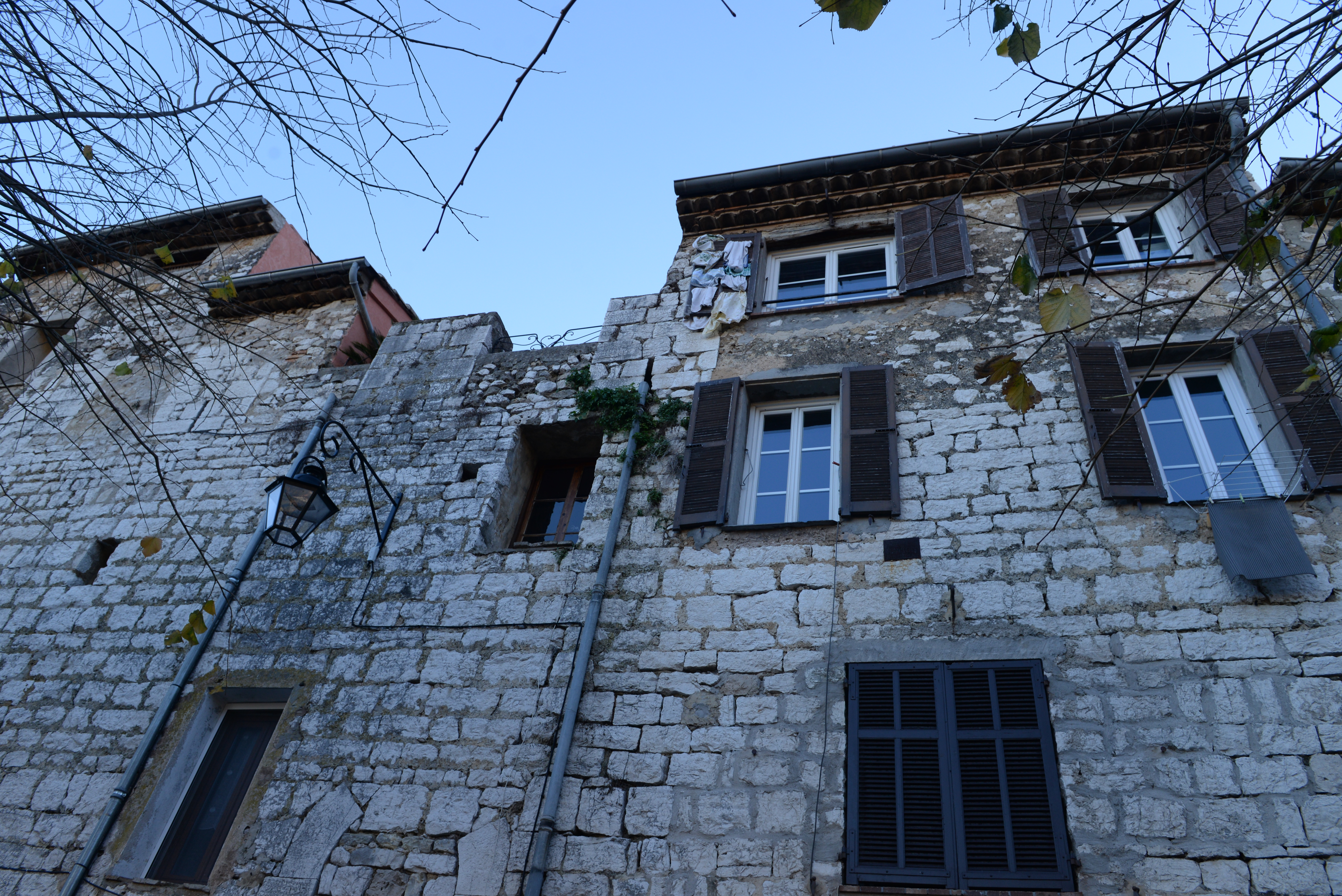 Remparts de Vence (Alpes-Maritimes)